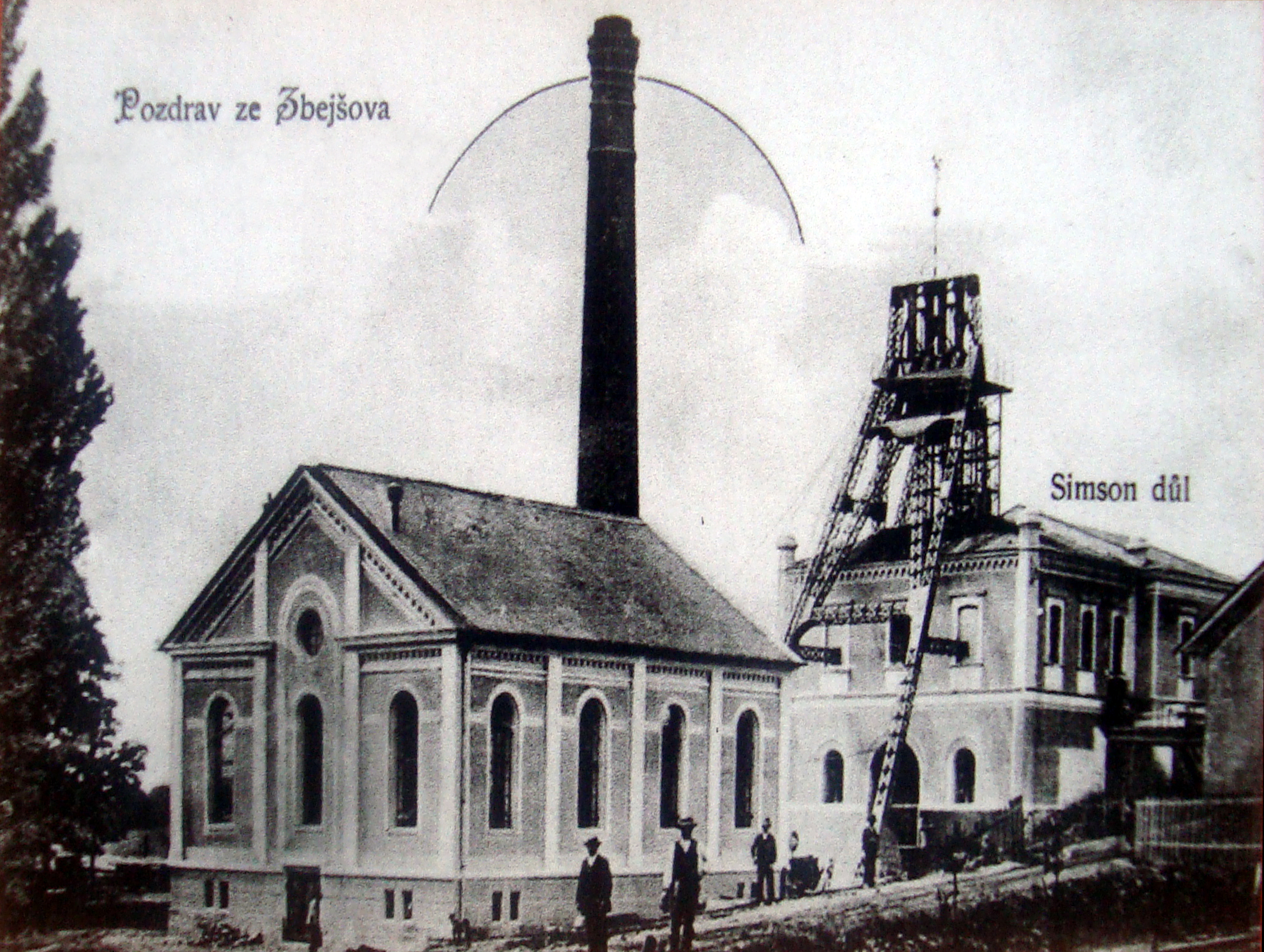 Důl Simson - Zbýšov, Pozdrav ze Zbejšova - Pohlednice zhruba z let 1905-1910 odeslaná 1912